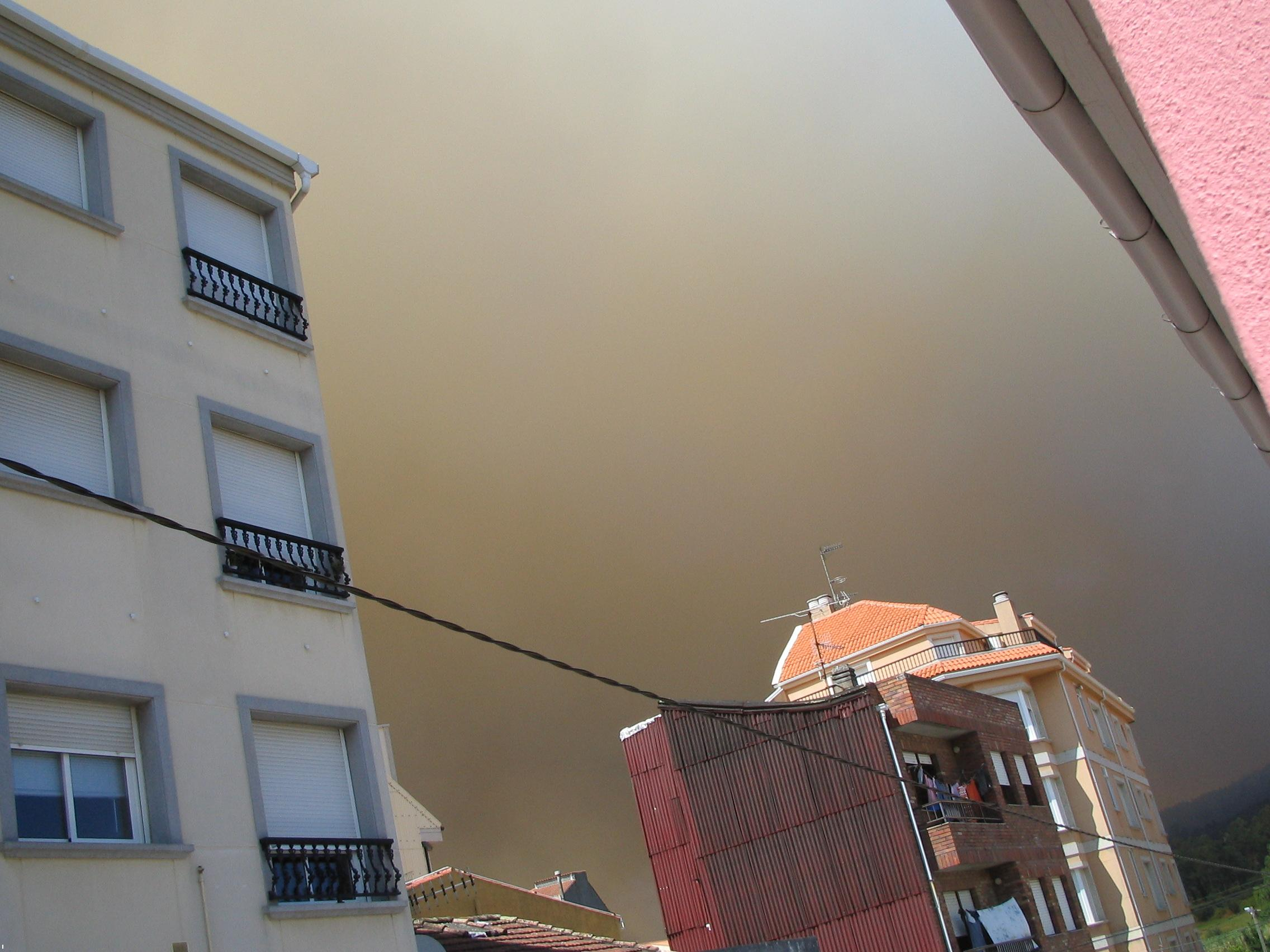 Wildfire in Vilagarcía de Arosa, Spain